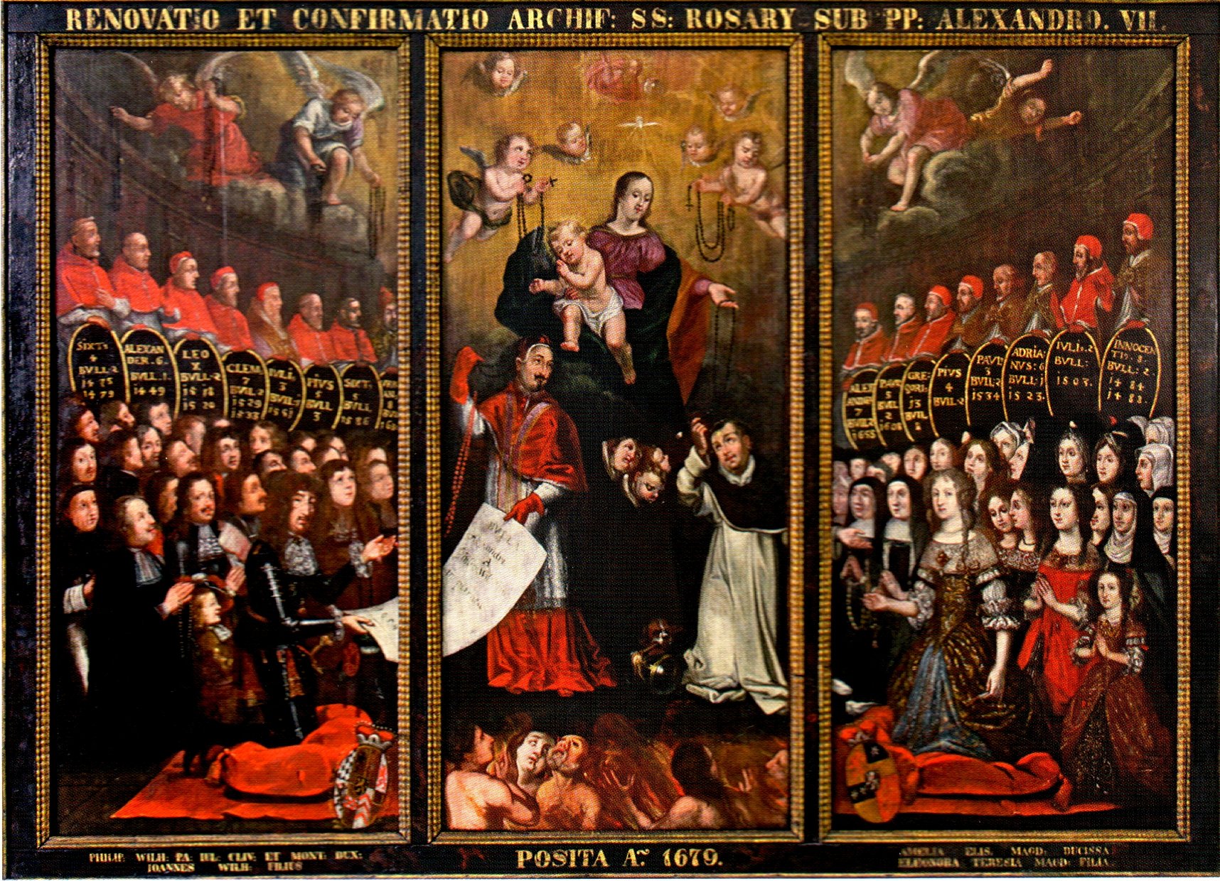 Kirche St. Lambertus, Düsseldorf-Altstadt Triptychon der Rosenkranzbrüderschaft. Die Inschrift oben: RENOVATIO ET CONFIRMATIO: SS: ROSARY SB PP: ALEXANDRO: VII. - Erneuerung und Bestätigung der Rosenkranzbruderschaft durch Papst Alexander VII. unten links:PHILIP. WILH: PA: JUL: CLIV: ET MONT: DUX: JOANNES WILH: FILIUS - Herzog Philipp Wilhelm, Pfalzgraf von Jülich, Cleve, Burg, und Sohn Johannes Wilhelm in der Mitte:POSITA A.~ 1679 - Gemalt 1679 rechts:AMELIA ELIS. MAGD. DUCISSA / ELEONORA TERESIA MAGD. FILIA - Herzogin Amelia Elisabetha Magdalena und Tochter Eleonora Teresia Magdalena Links unter den Päpsten Herzog Philipp Wilhelm mit seinem Sohn und den männlichen Mitgliedern der Rosenkranzbrüderschaft. Auf der rechten Seite Herzogin Amelia Elisabeth mit ihrer Tochter und den weiblichen Mitgliedern der Bruderschaft.